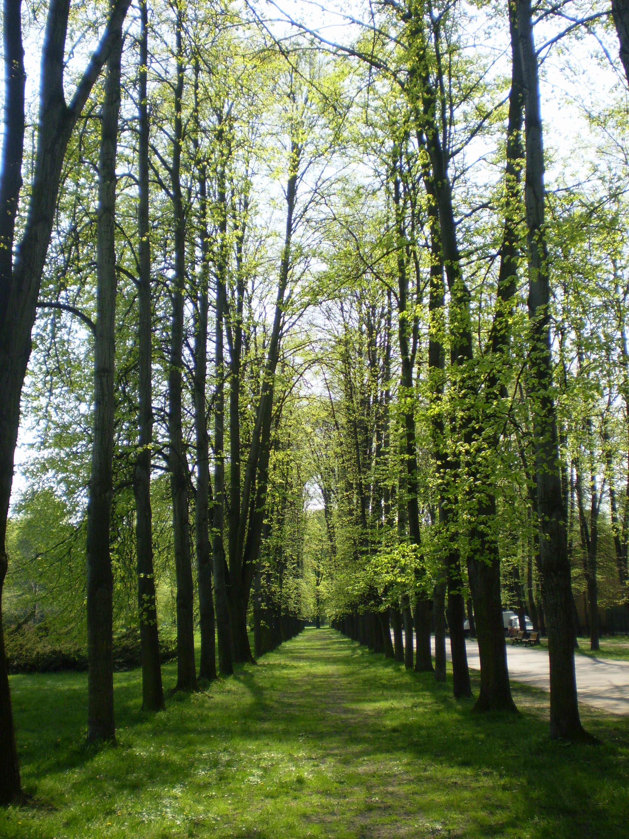 KOmenského sady v Ostravě.